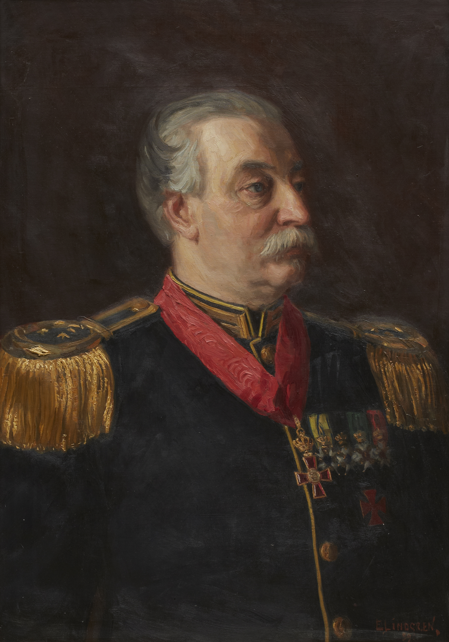 Porträtt föreställande överste Ludvig Thimgren. Signerad och daterad E Lindgren 99. Olja på duk, 85 x 69.